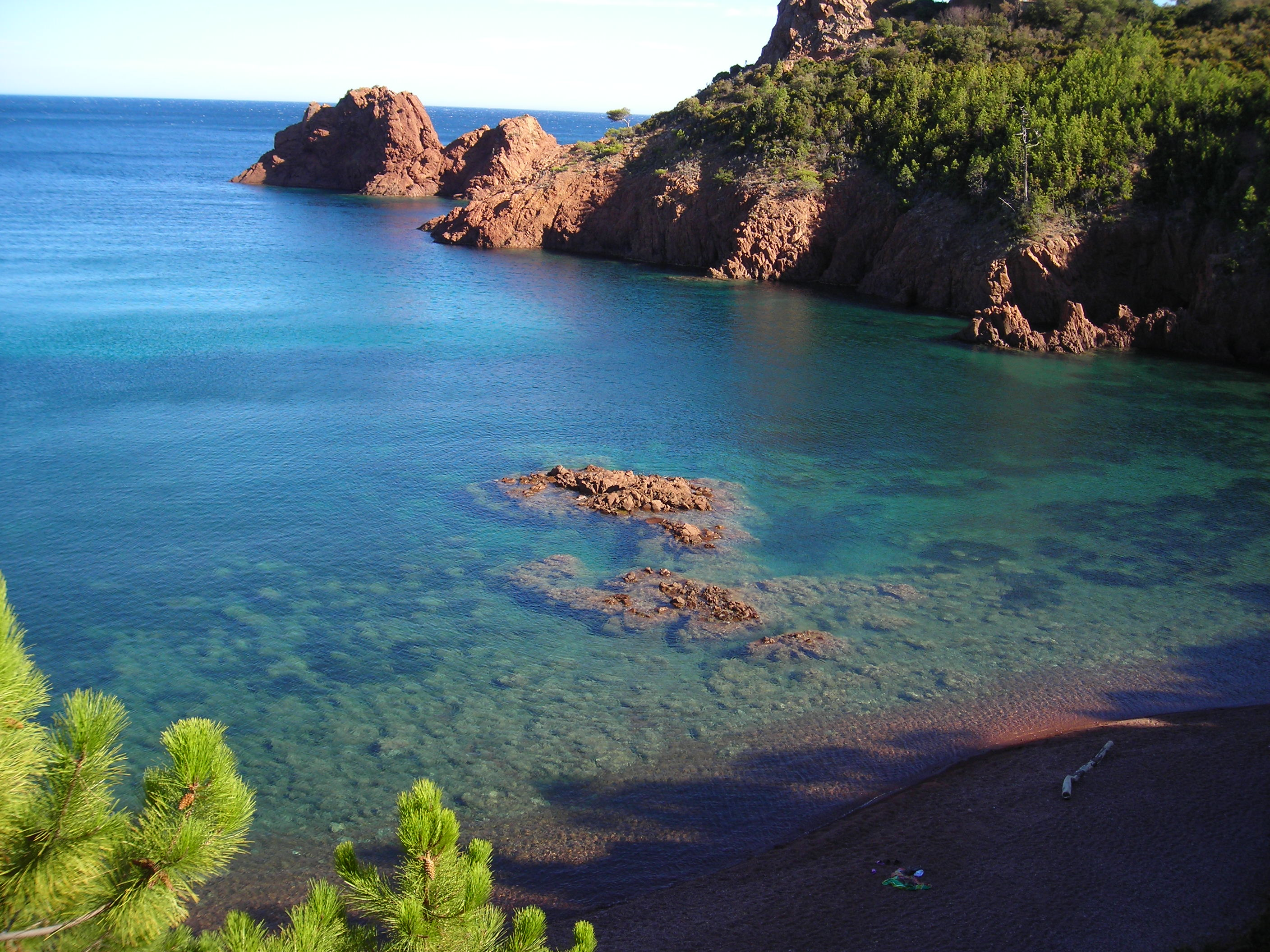 Calanques dans l'esterel